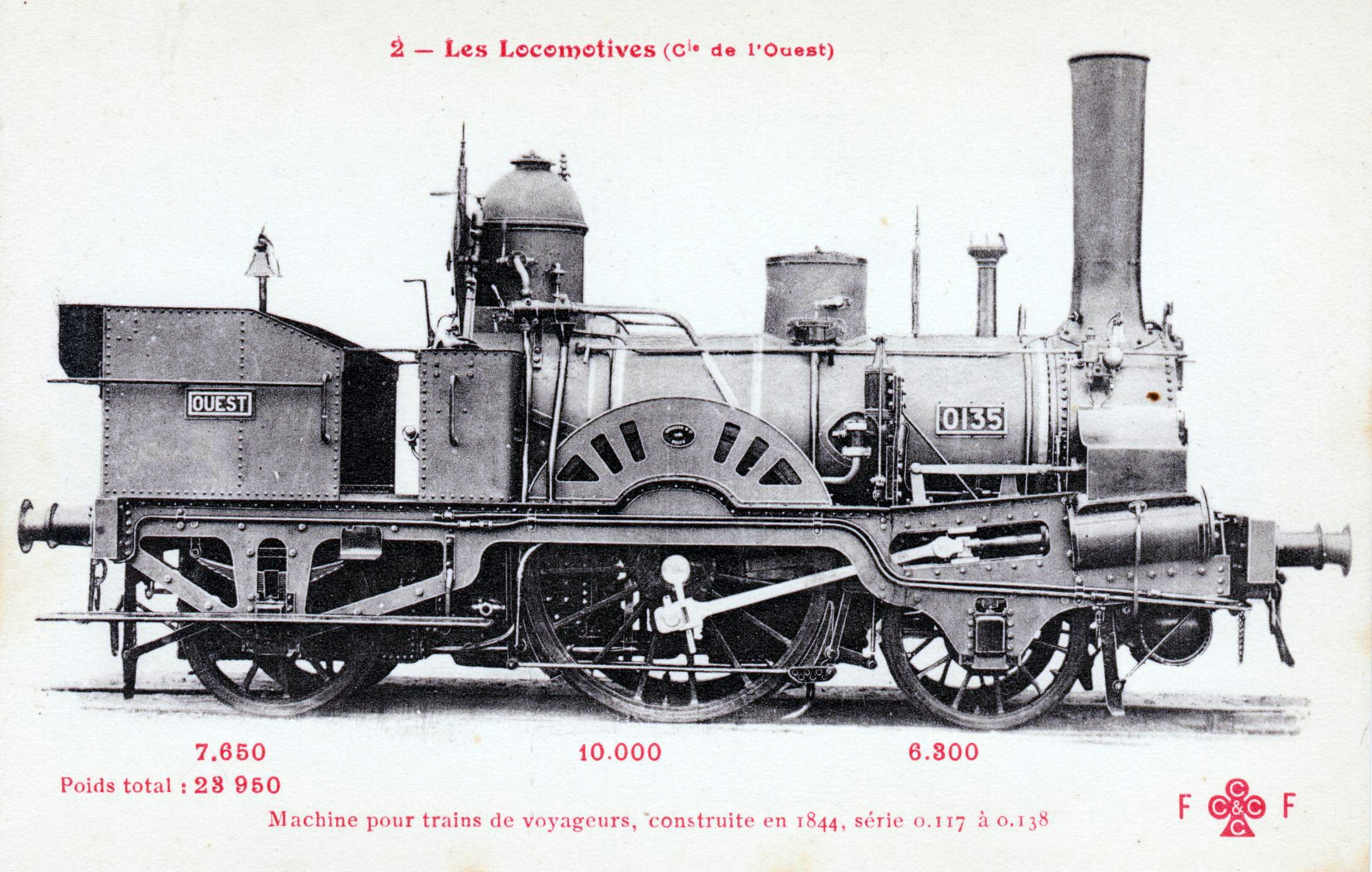 Locomotive construite par les ateliers Allcard Buddicom aux Chartreux à Rouen en 1844 sous le n° 135 et incorporée dans le parc de la Cie de l’Ouest sous le n° 0135 (série 0105 à 0138, tendérisée entre 1860 et 1865). surface de grille 1,02 m² timbre 17 k surface foyer 4.95 m² surface tubes 52,95 m² diamètre roues motrices 1,71 m diamètre des cylindres 0,317 m course des pistons 0,534 m écartement des essieux extrêmes 3,959 m poids total 23.950 kil. poids adhérent 10.000 kil.